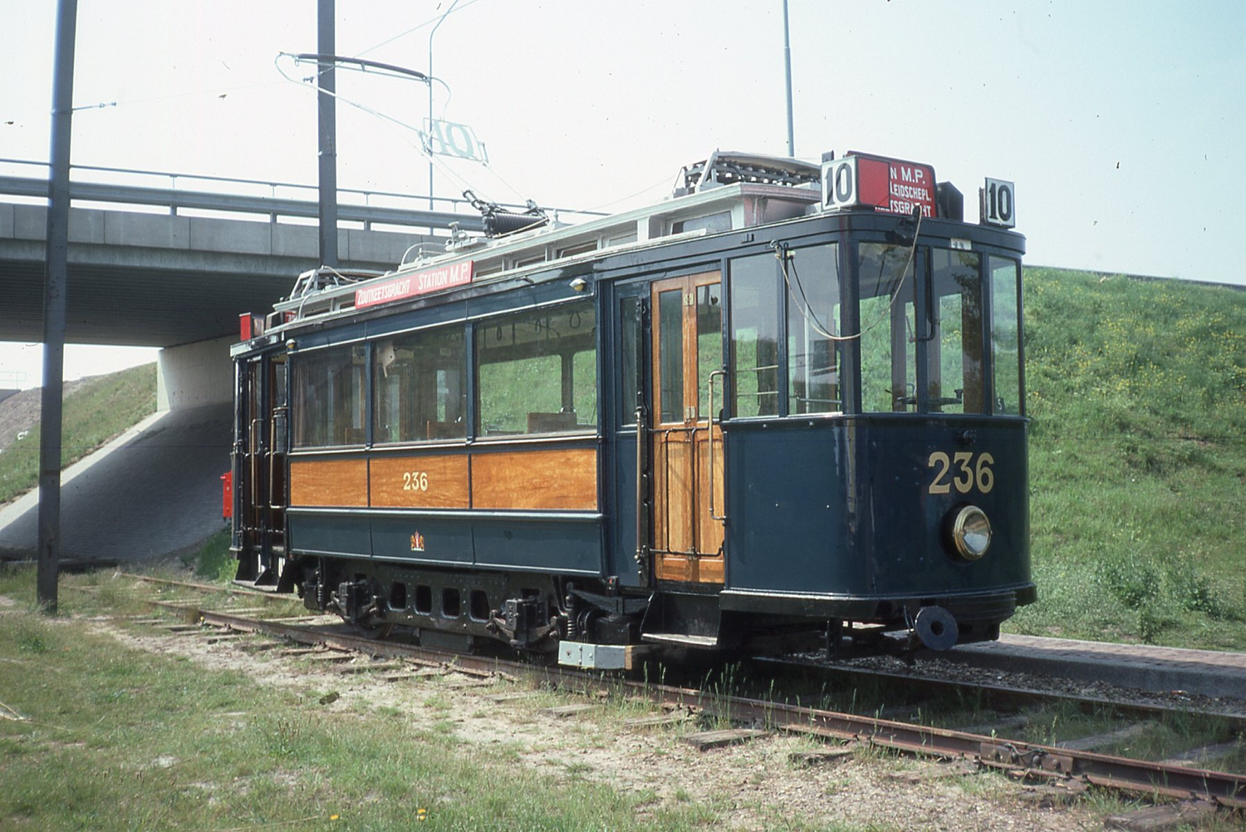 Photo: Trams aux Fils. En 1976, Le terminus de la ligne du musée ce terminait à cette endroit, après le pont la voie continuait mais pas la ligne aérienne. Je pense que la situation à changer à ce jour.